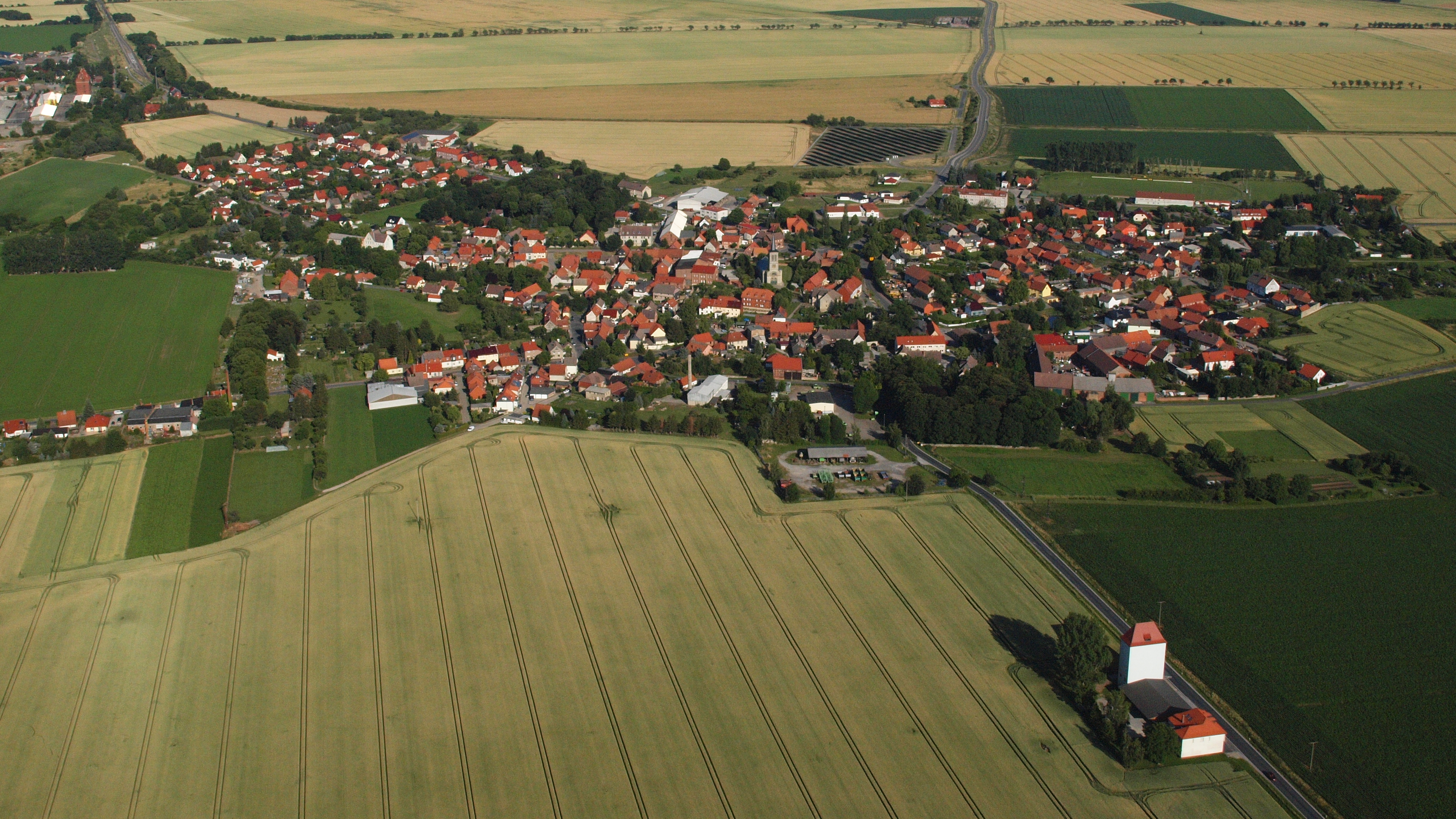 Heudeber, Luftaufnahme (2015)